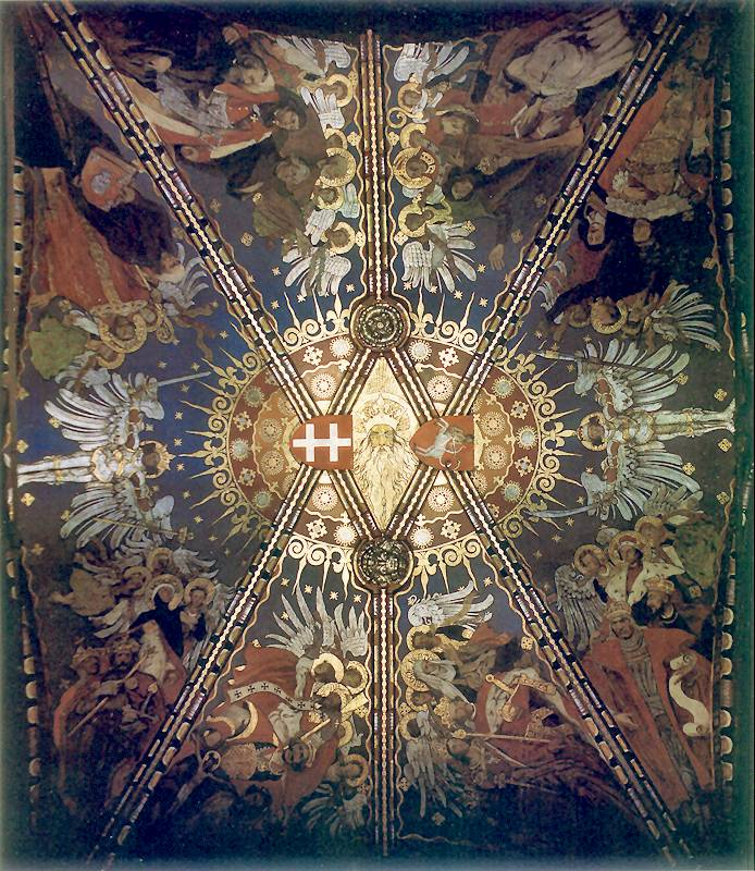 Panteon Wielkich Polaków. Polichromia, kaplica Świętej Zofii, Katedra na Wawelu.